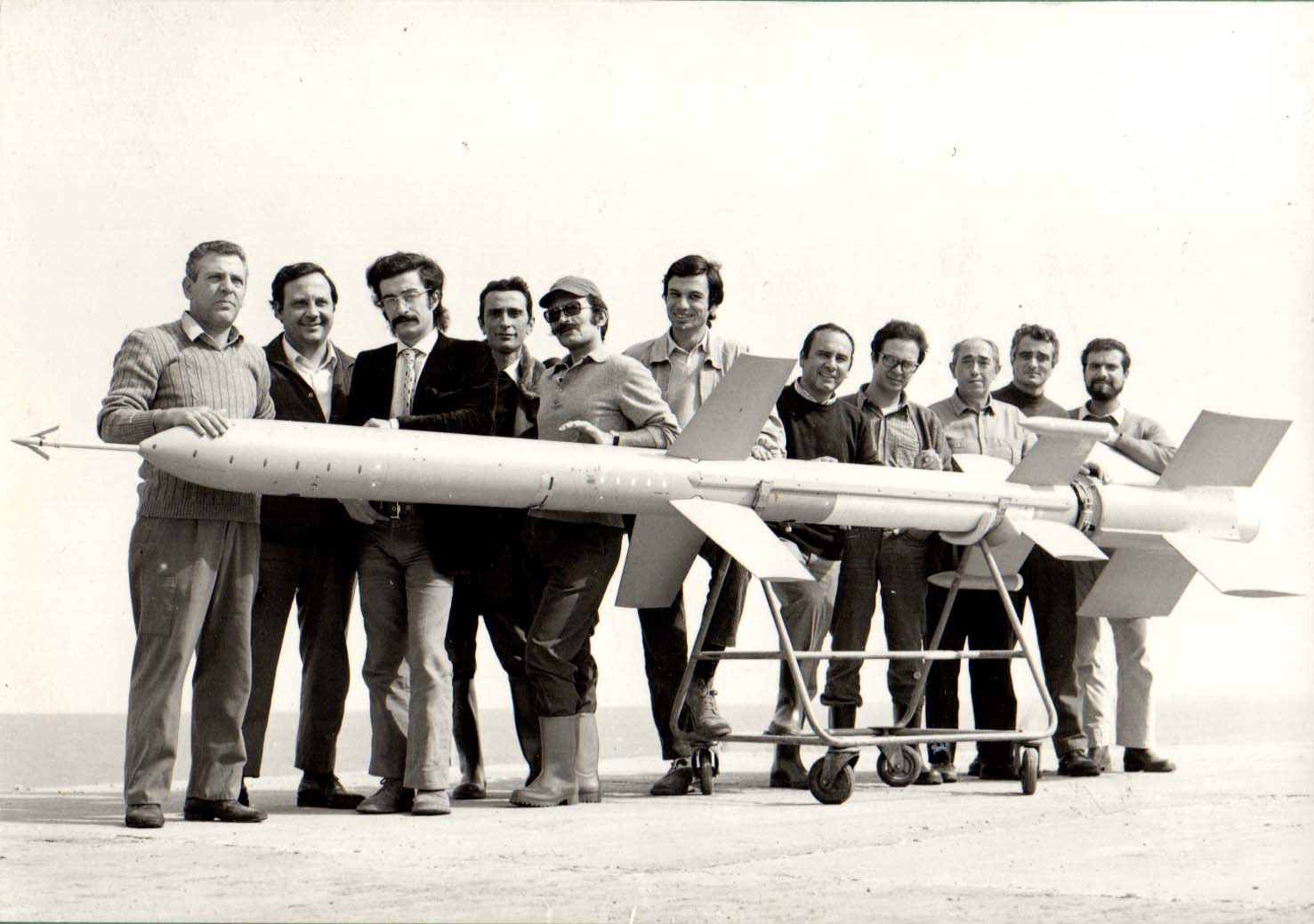 Prototipo Vulcano Capo S. Lorenzo ( Sardegna ) luglio 1971